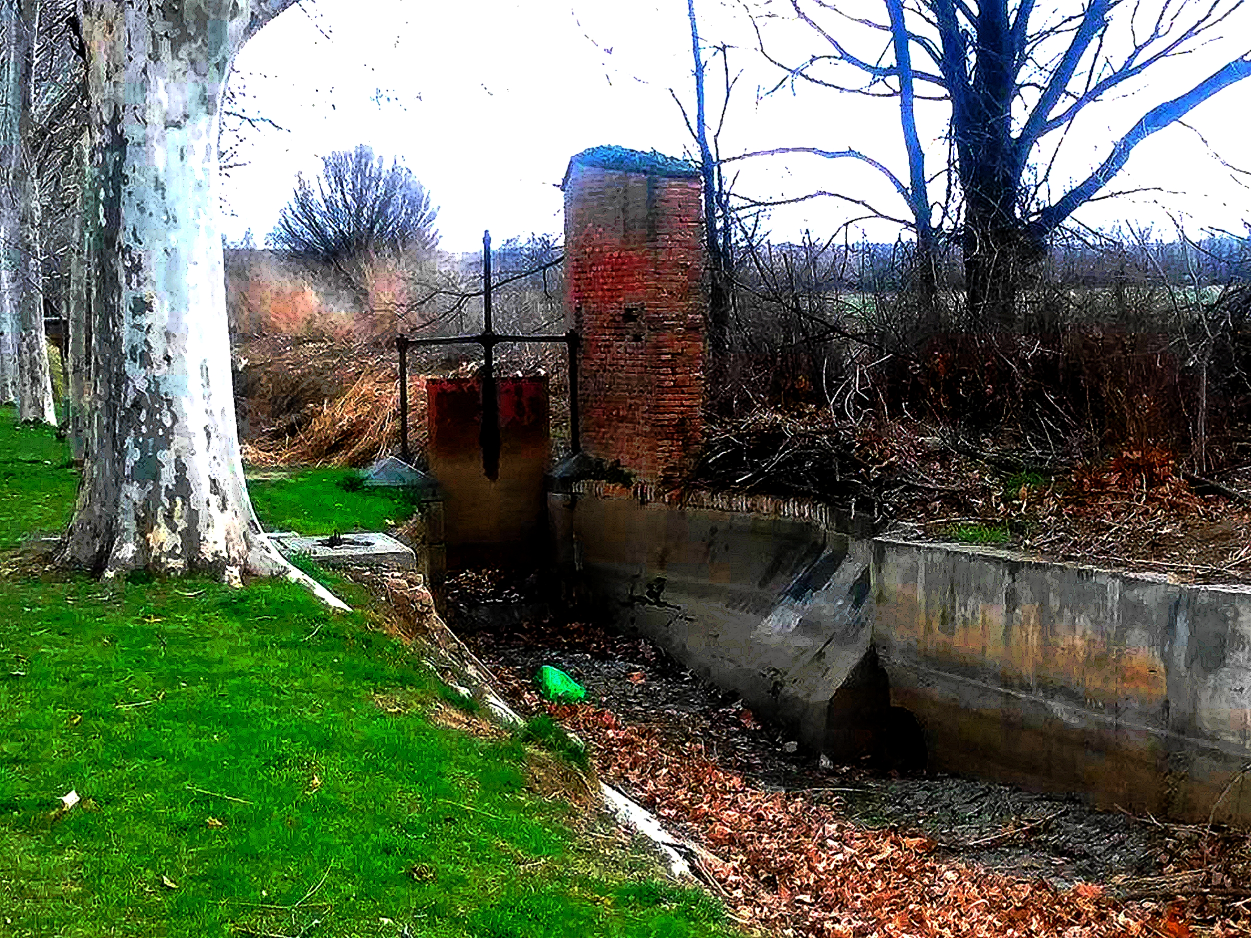 Estado actual (2016) de compuerta del caz en el tramo medio del Paseo de Los Chopos.